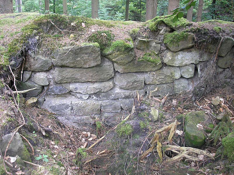 Frühmittelalterlicher Ringwall Alte Burg (Altenstein), Landkreis Haßberge, Unterfranken. Freigelegtes Trockenmauerwerk, Innenseite / Alte Burg ("Old castle", early middle age) near Altenstein, Lower Franconia, Germany. Part of the walls from inside. Eigene Aufnahme, Aug 2006 / Own photo, Aug. 2006